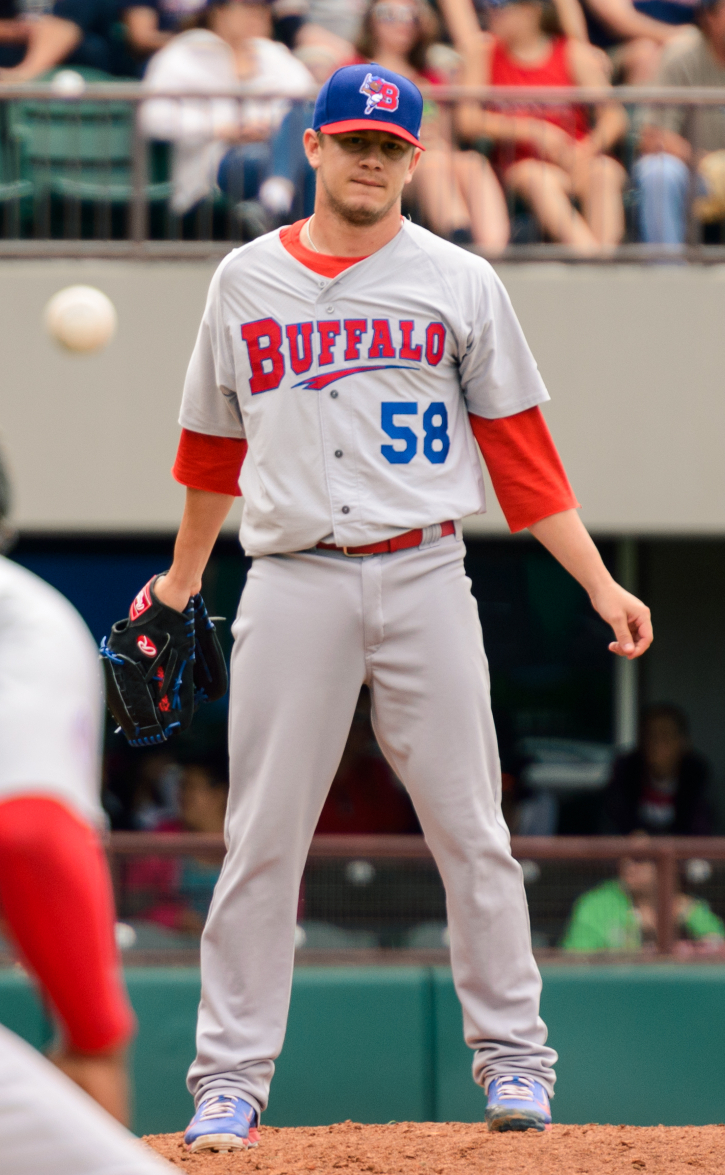 Rob Rasmussen